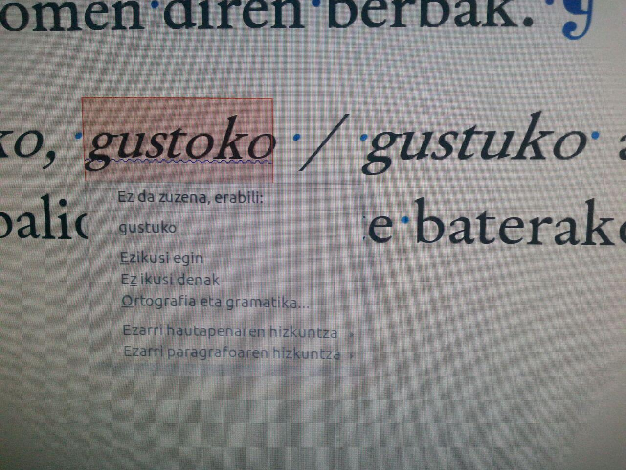 Zuzentzaile automatikoa_Hobelex_hurbilagotik